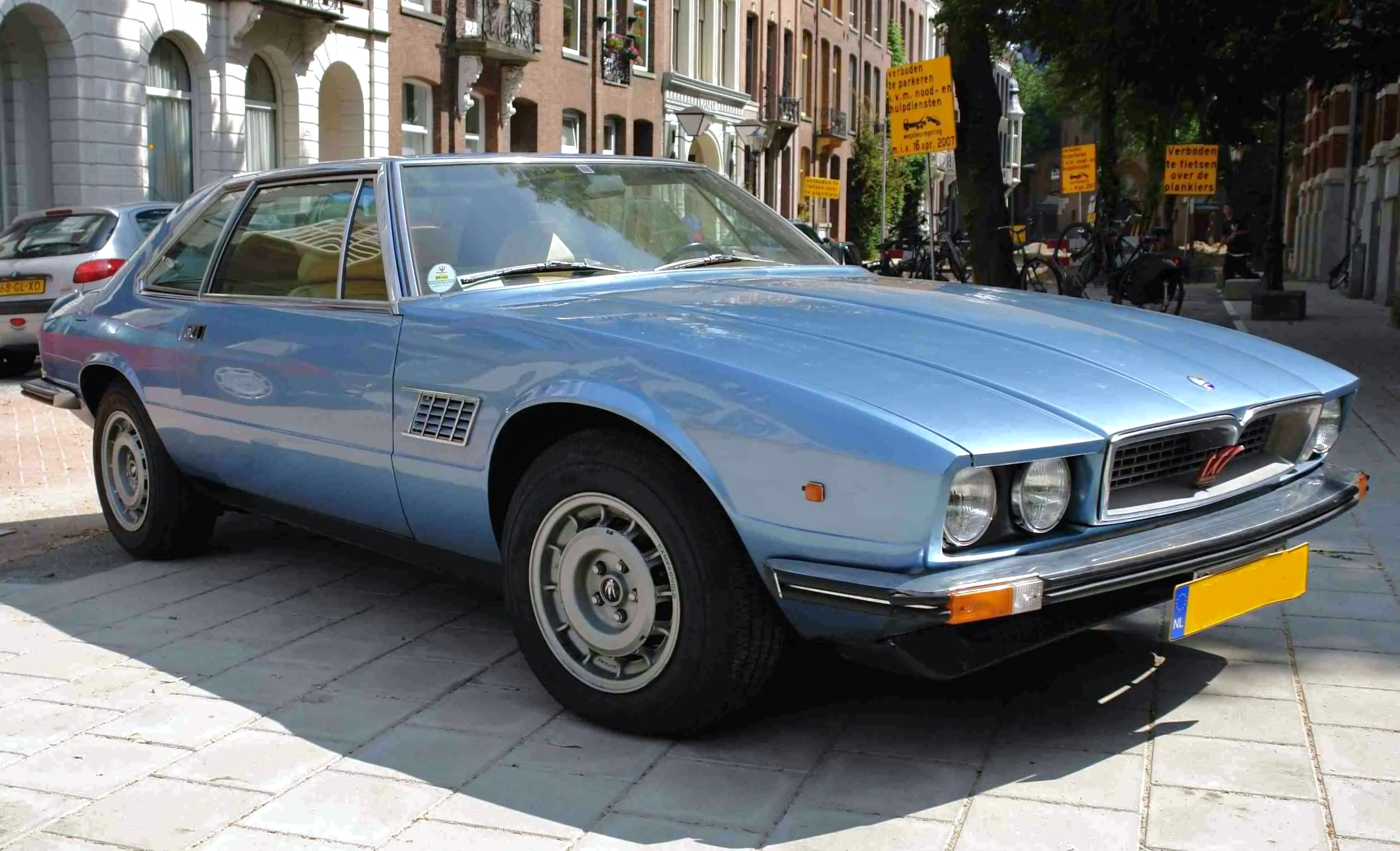 Maserati Kyalami Prototype